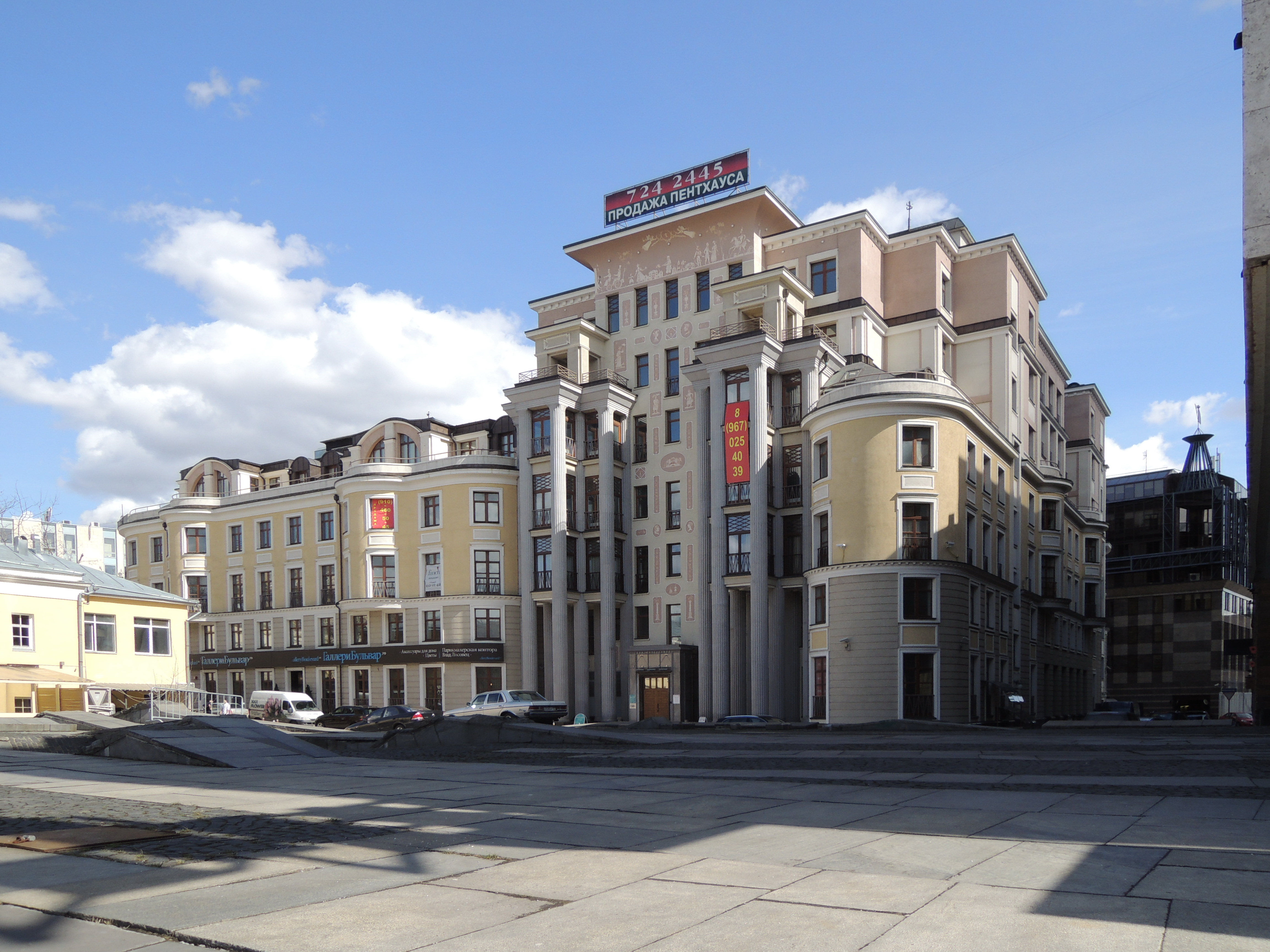 Большой Гнездниковский переулок № 3 — административно-жилой комплекс, 2008, архитекторы С. Ткаченко, Н. Рыбин, О. Дубровский, Л. Шевченко[3]. Ранее на этом месте стоял Sight symbol black.svg памятник архитектуры (региональный) — дом драматурга К. А. Тарновского, которого часто посещали М. С. Щепкин, Г. Н. Федотова, П. И. Чайковский, Н. Г. Рубинштейн и другие выдающиеся деятели русской культуры[2][4]. В ходе строительства административно-жилого комплекса дом был разобран и заменён новоделом